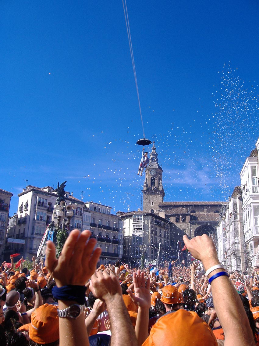 Het neerdalen van Celedon over het plein La Virgen Blanca.